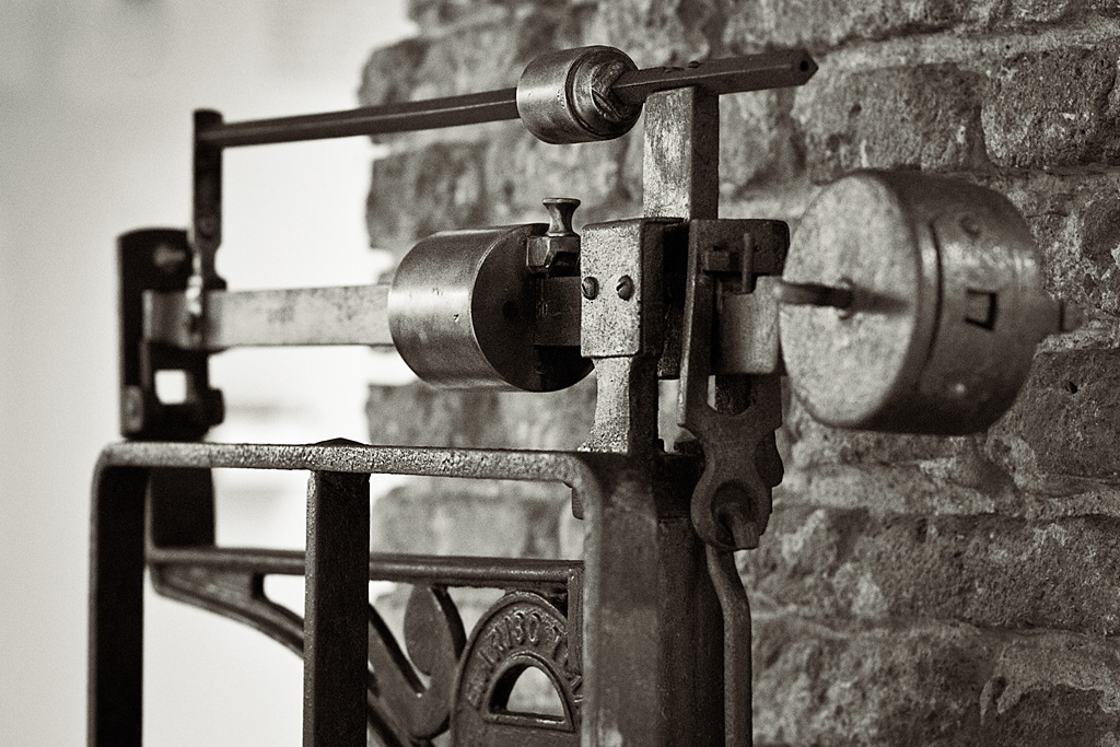 Museo del Comercio de Salamanca Colección Industrias Mirat Objeto: Báscula Arisó para pesar sacos, 1940. Wiki Loves Art Fotografía: Juan Miguel Ávila del Arco | Darco TT Canon EOS 7D | Objetivo Canon 50mm 1.4 f/3.2 | 1/80 | ISO 5000 Museo del Comercio y la Industria Native nameMuseo del Comercio y la Industria (Salamanca)LocationSalamanca, (Spain)Coordinates40° 57′ 54.29″ N, 5° 39′ 14.79″ W Established2006Web page control : Q6034415 VIAF: 169904596 BNE: XX4875307 institution QS:P195,Q6034415